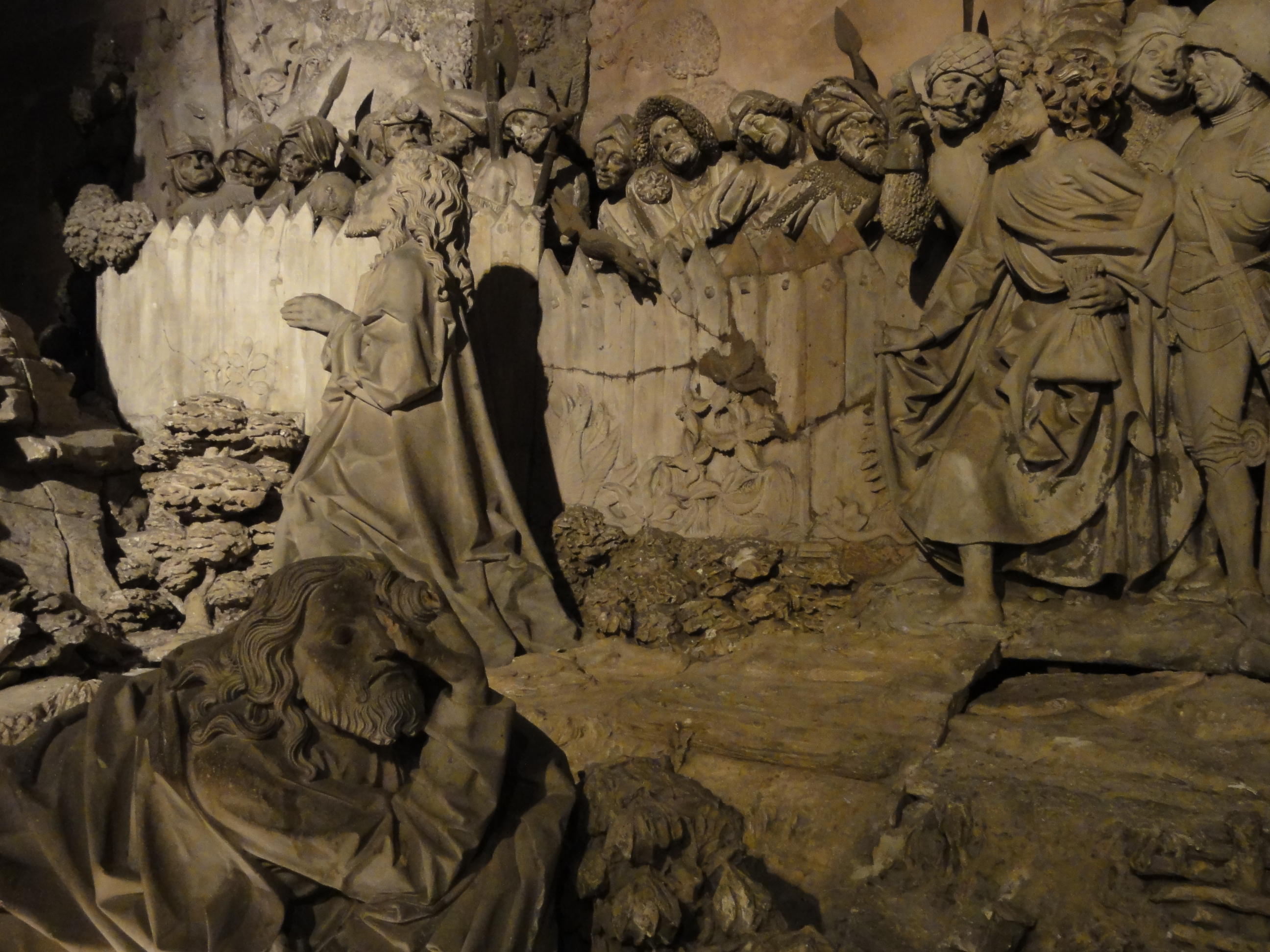 Alsace, Bas-Rhin, Cathédrale Notre-Dame de Strasbourg (PA00085015). Croisillon nord, Mont des Oliviers (XVe).